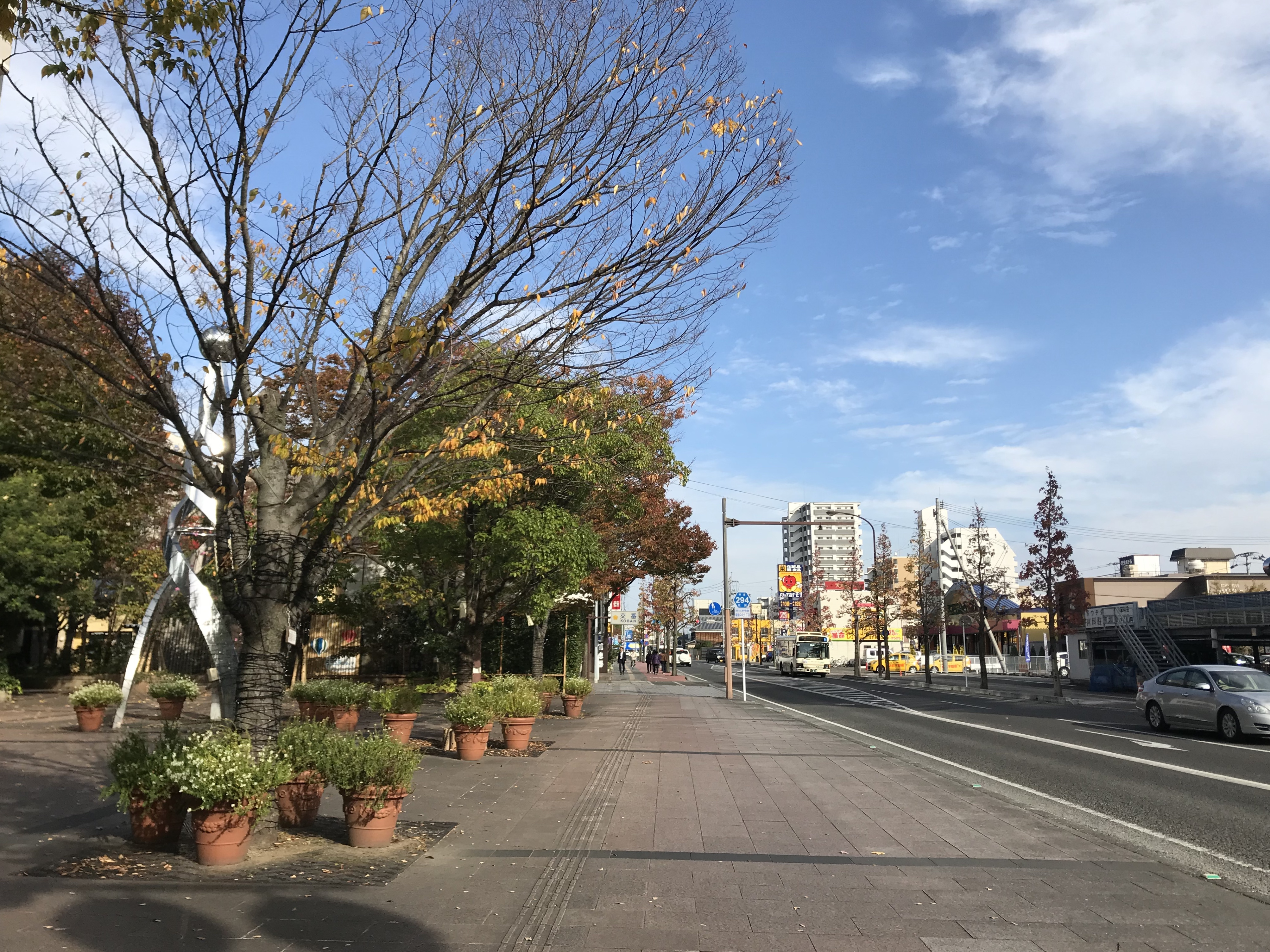 駅前交番西交差点東側の様子